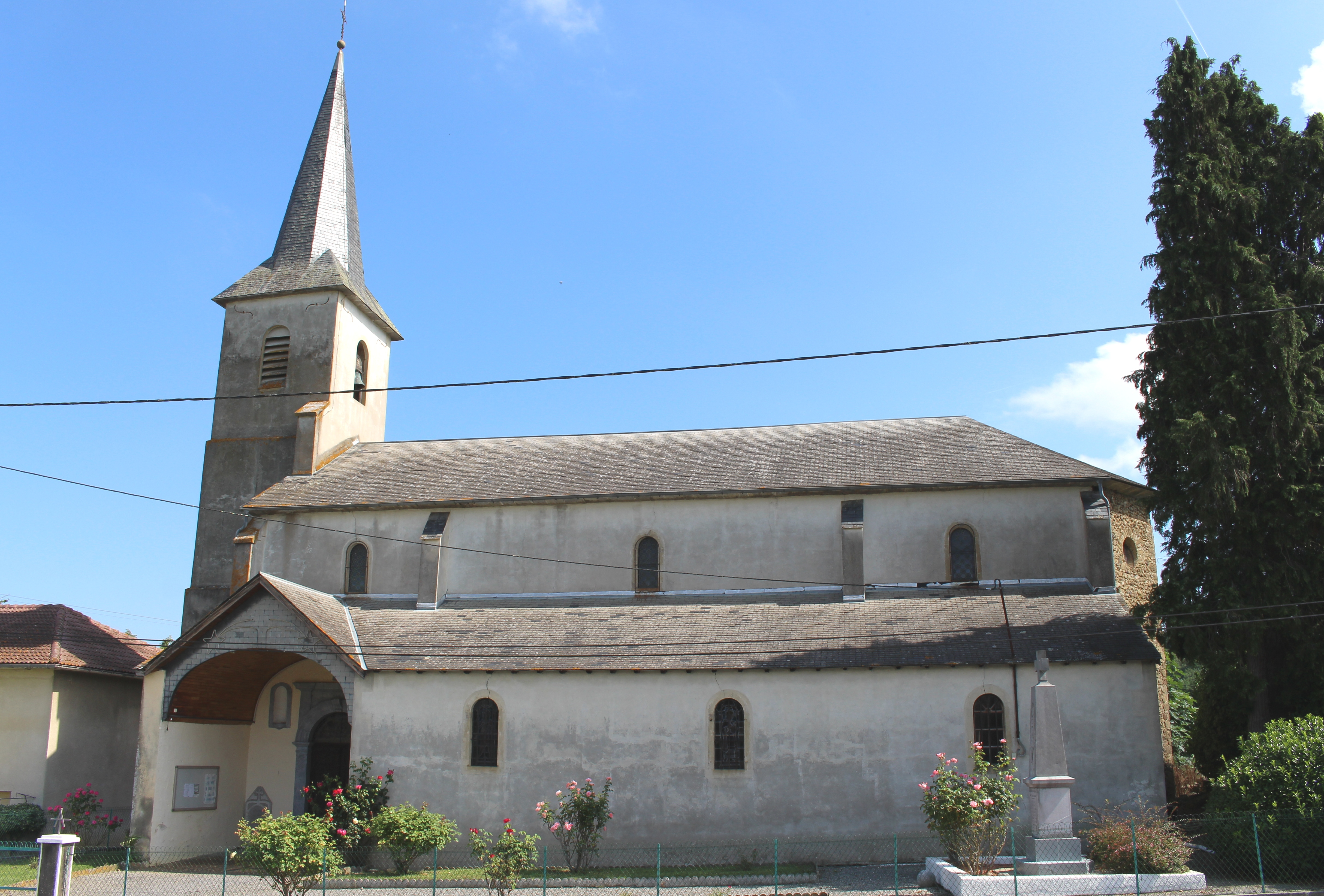 Église de la Nativité-de-la-Sainte-Vierge de Montastruc (Hautes-Pyrénées)